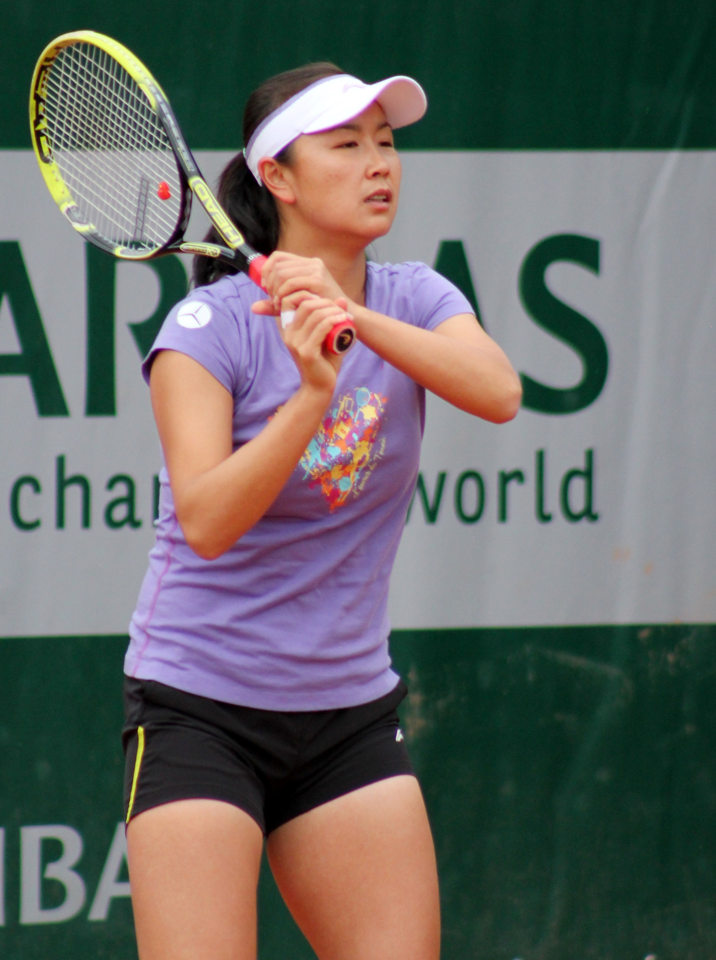 Peng RG13 (4)